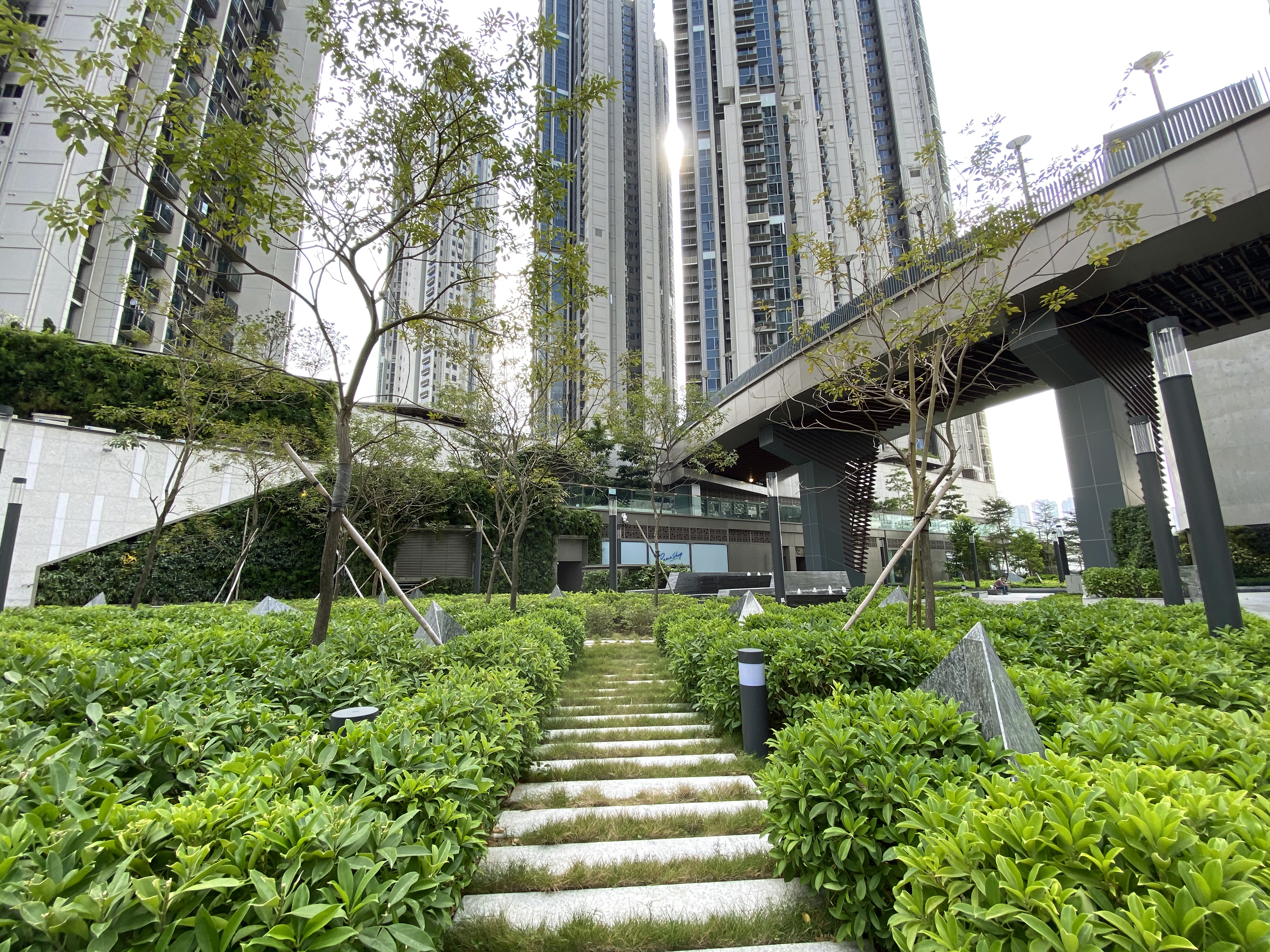 OP Mall Level 2 garden